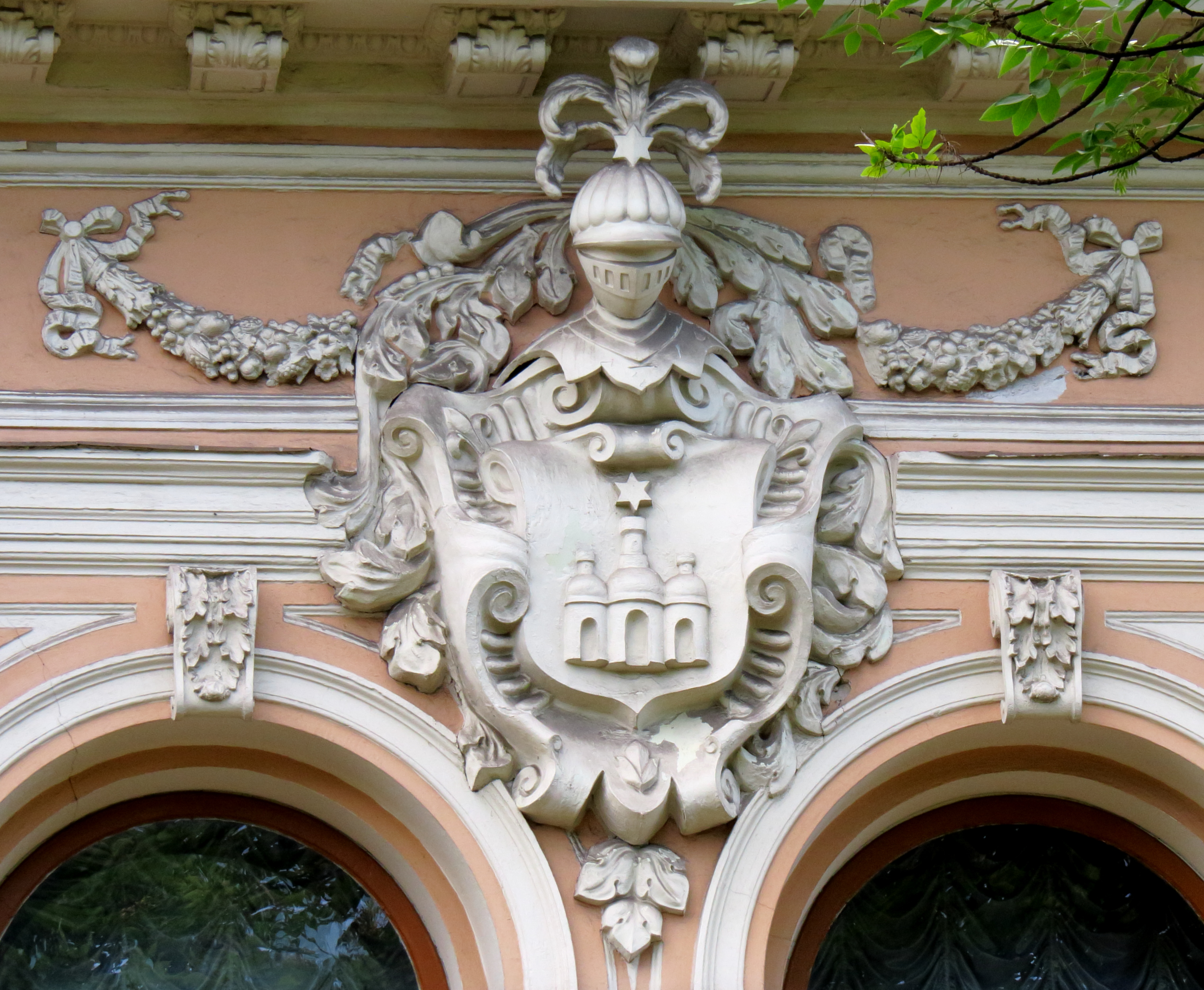 Герб Ханенко на их особняке в Киеве по ул. Терещенковской, 15 (Музей искусств им. Ханенко)